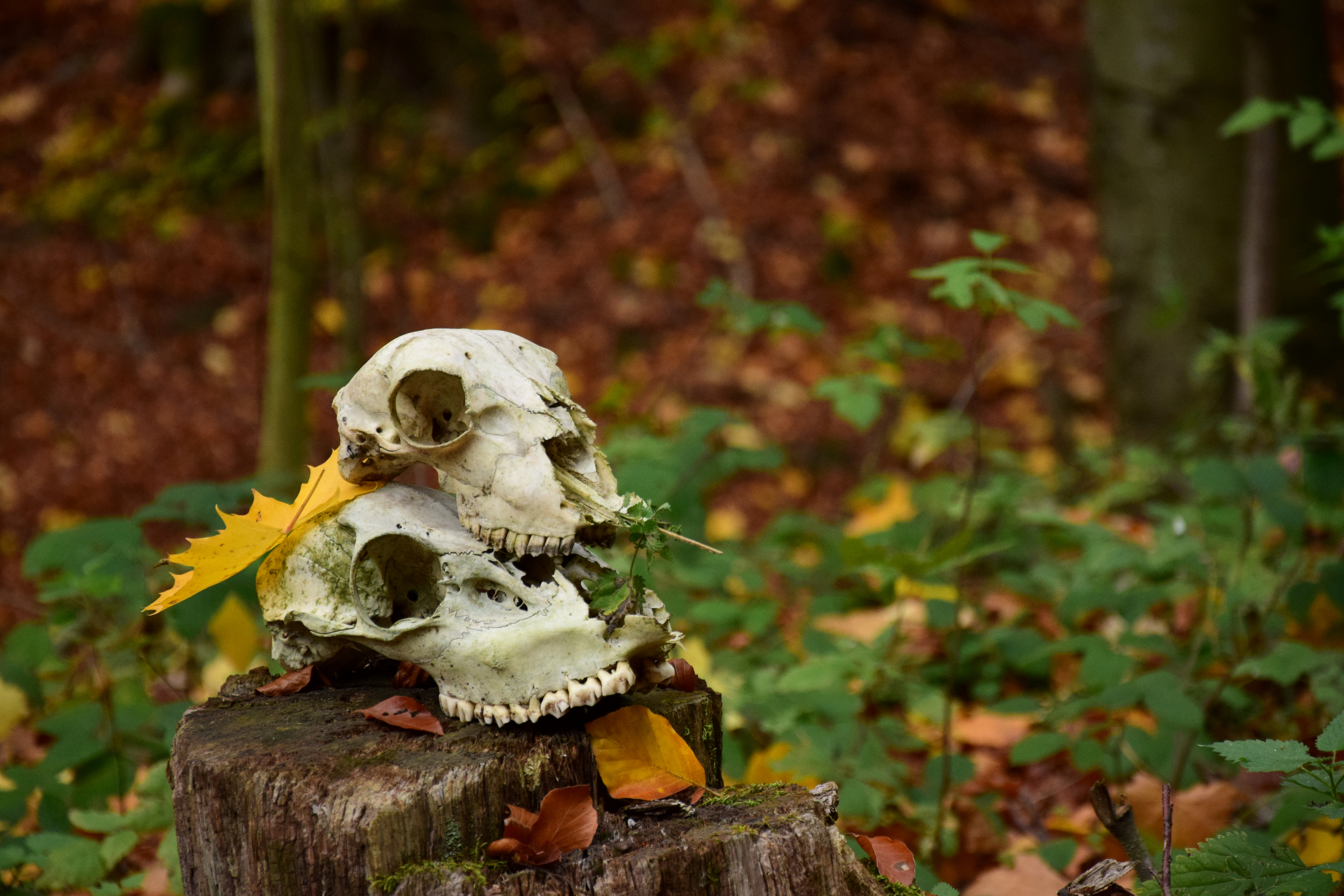 Přírodní památka Drmaly – zvířecí lebky